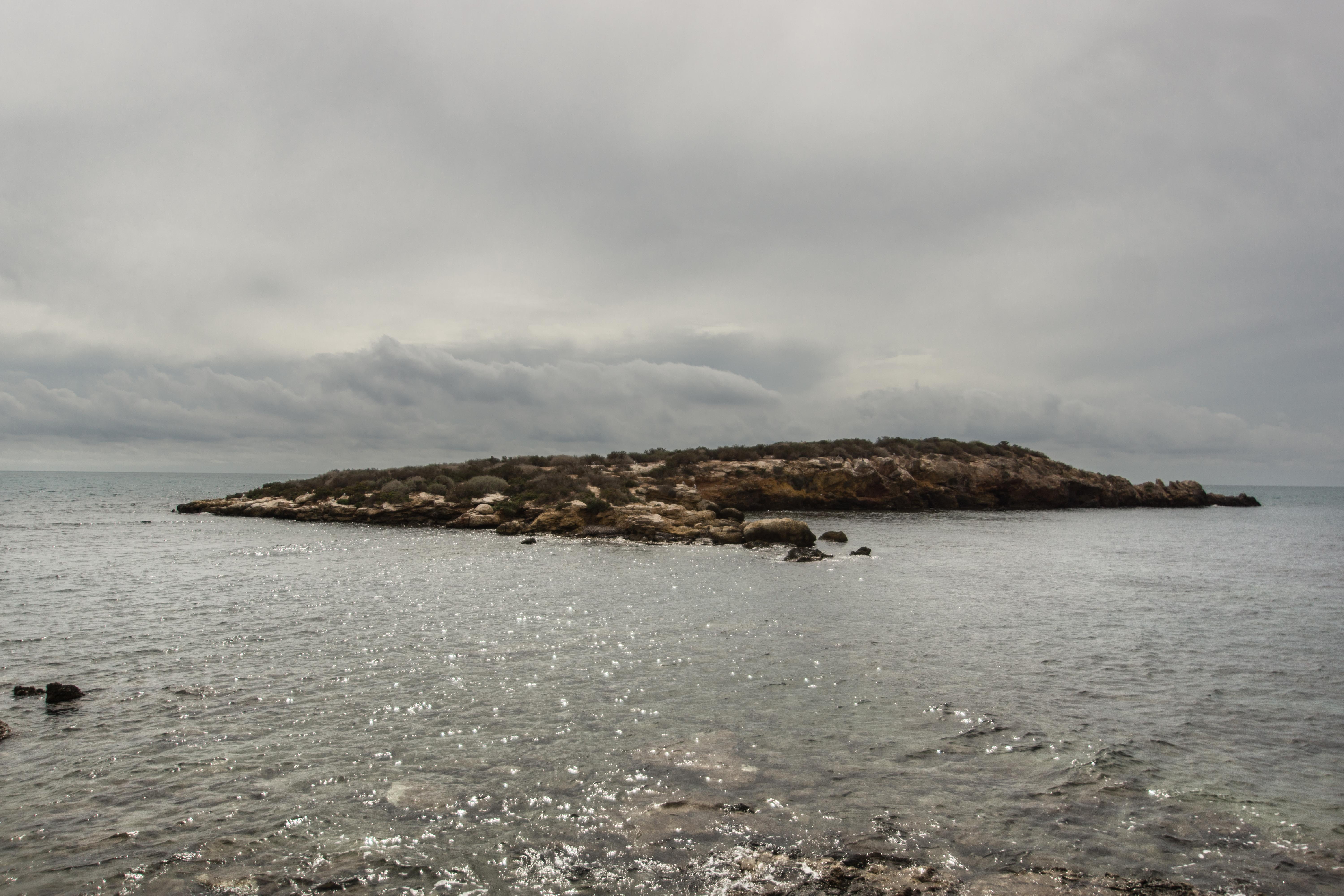 Isla Plana. Municipio de Cartagena, en la Bahía de Mazarrón